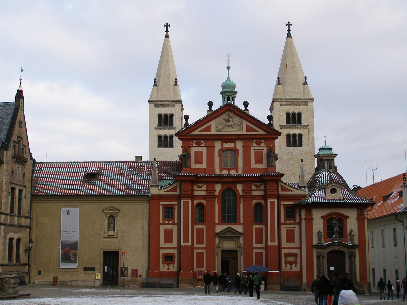 Pražský hrad, Praha 1, bazilika svatého Jiří.